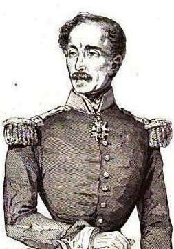 Détail d'une gravure représentant le général Changarnier en 1848-49.